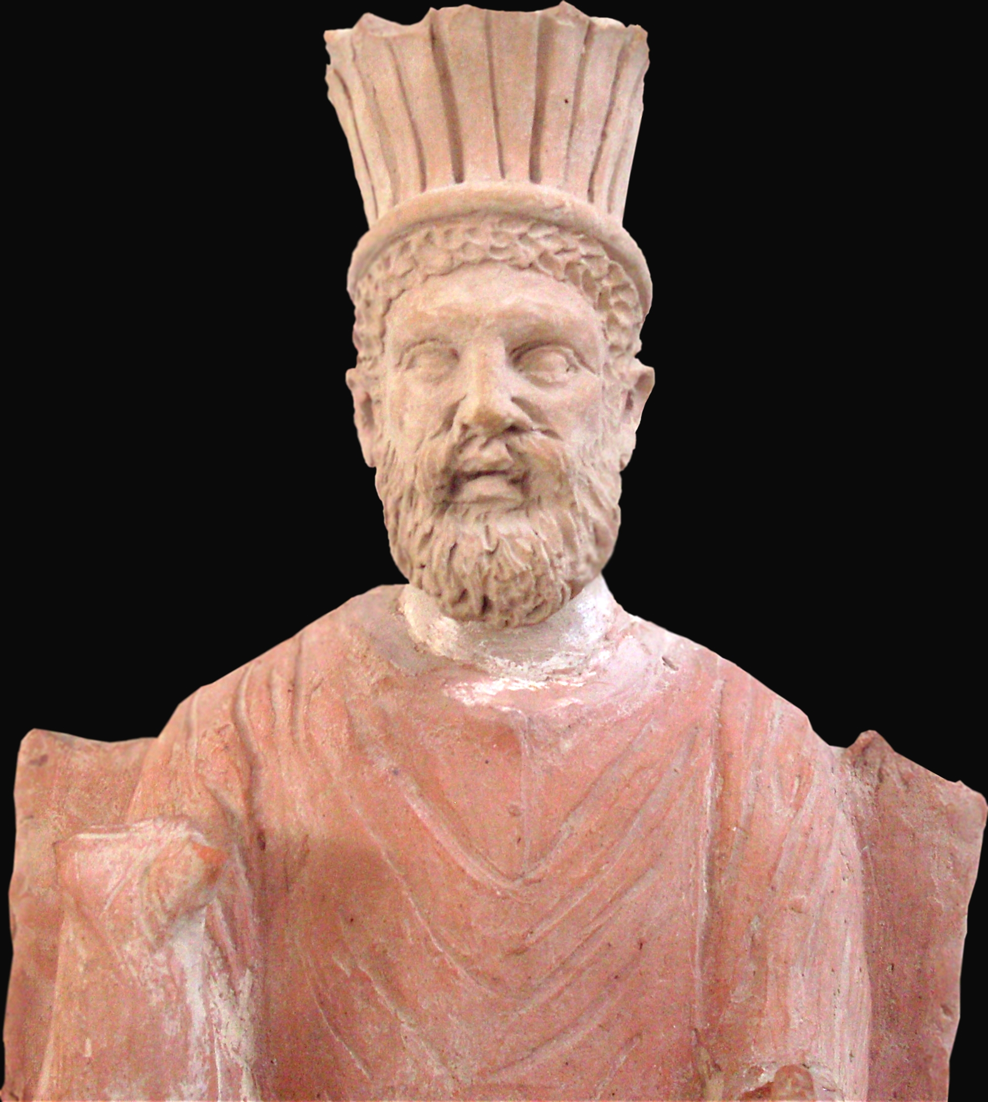 Statuette en terre cuite de Baal Hammon retrouvée à Thinissut exposée au musée de Bardo